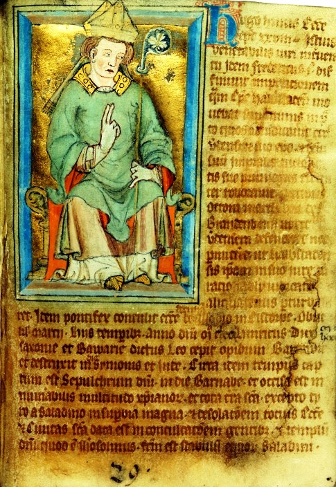 Bischof Hugo von Verden in einer mittelalterlichen Handschrift